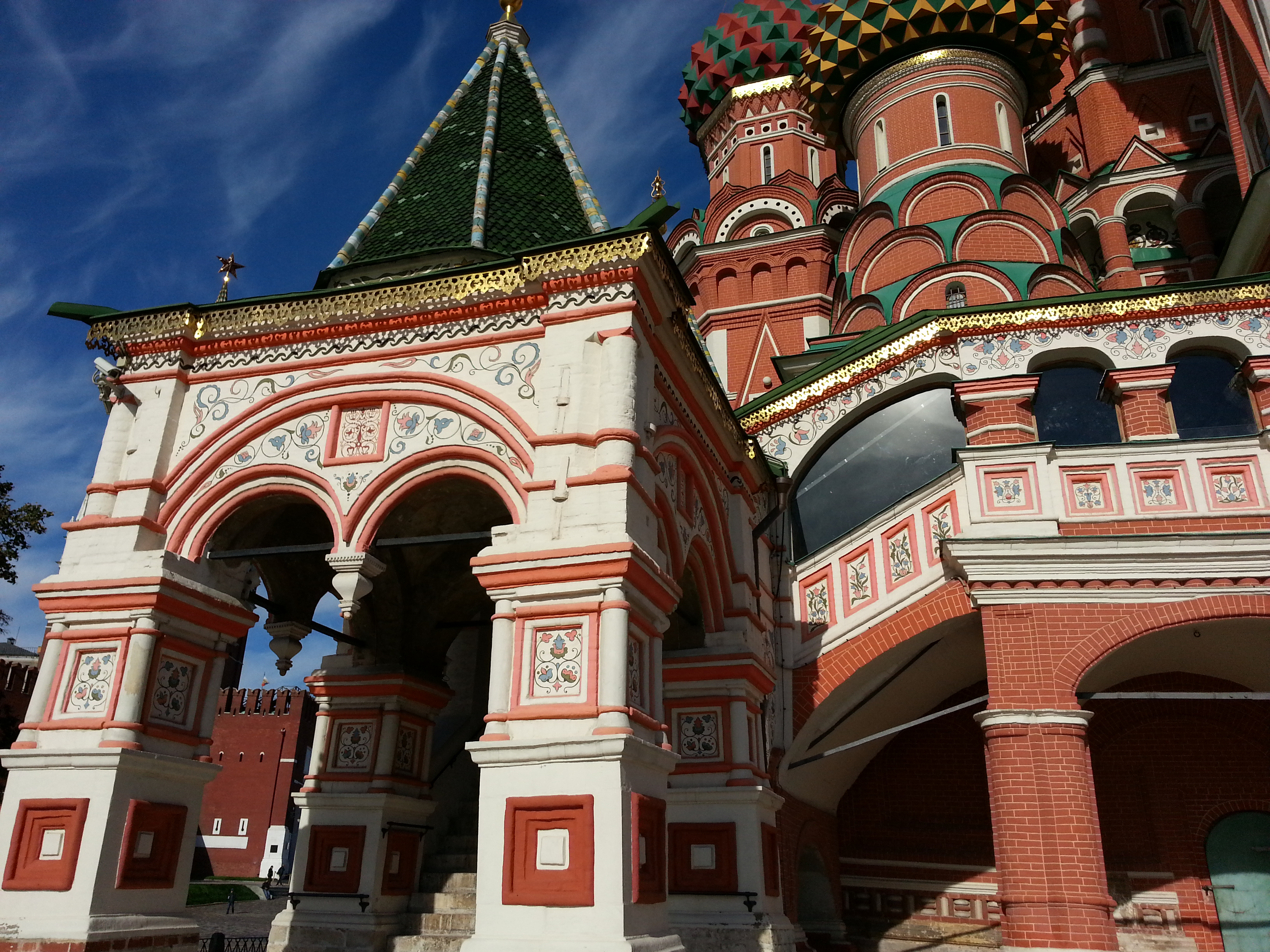 Собор Покрова Пресвятой Богородицы на Рву, придел, крыльцо, галереи и колокольня (Москва и Московская область, Москва, Красная площадь)